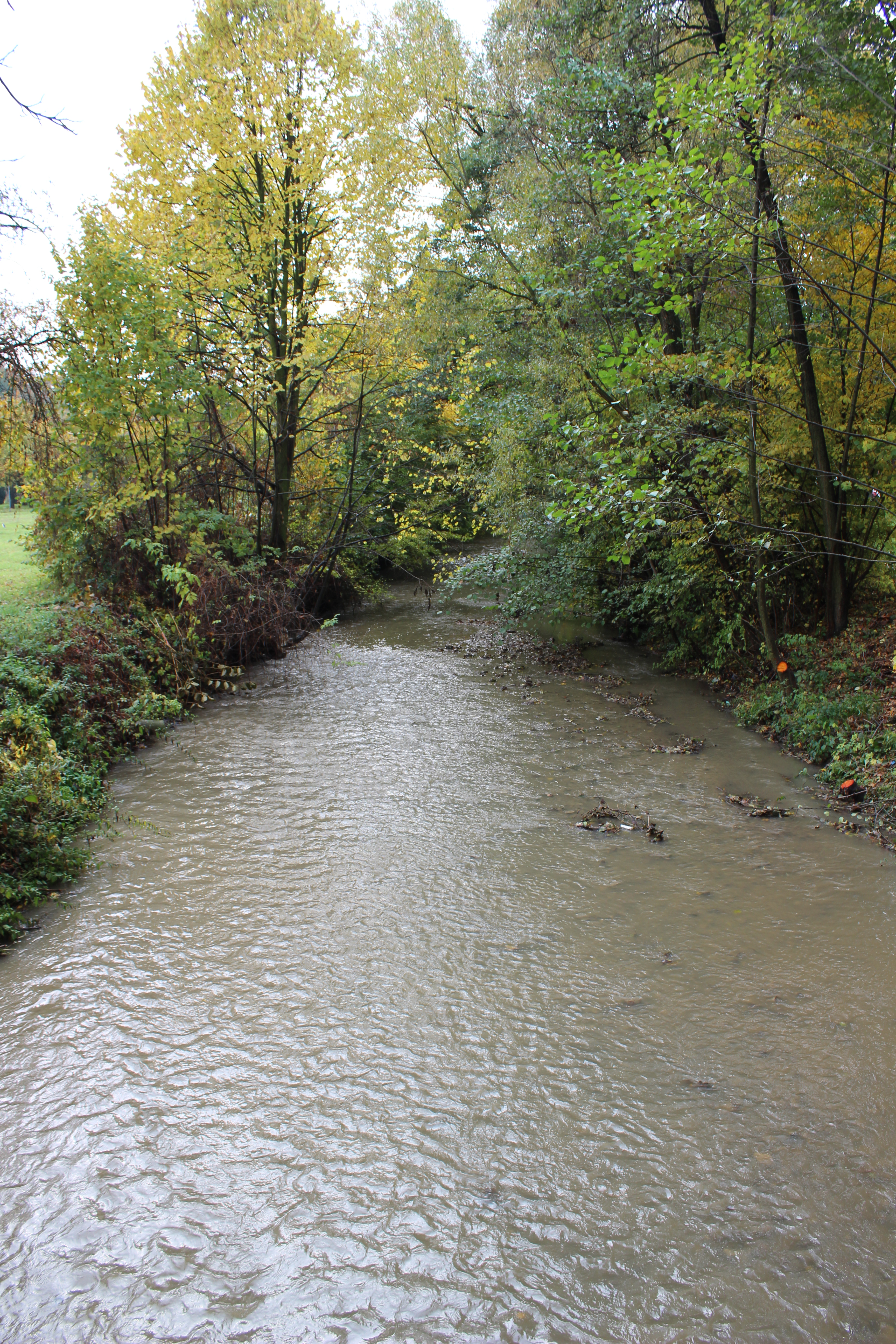 Potok Bošáčka v Zemianskem Podhradie (pohled k jihu z mostku vedoucímu ke zdejšímu kulatému kostelu).